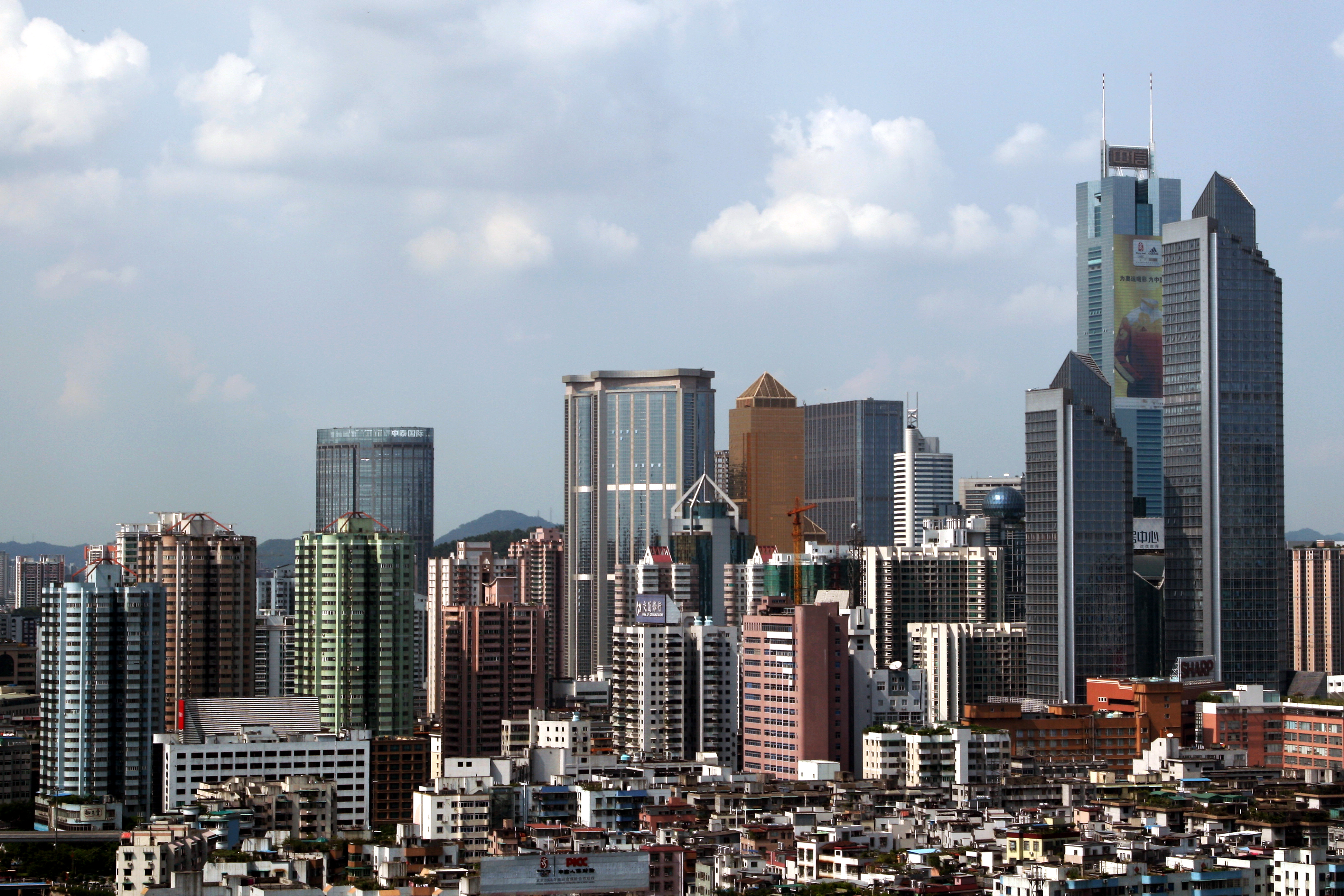 中文（中国大陆）: 广州的天河北CBD高楼林立。